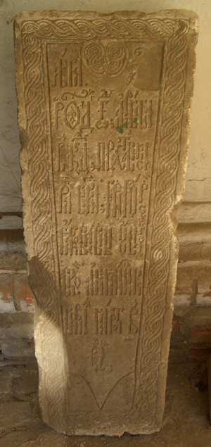 Фотография сделана в городе Ярославле в Спасо-Преображенском монастыре (ныне — Ярославский музей-заповедник).